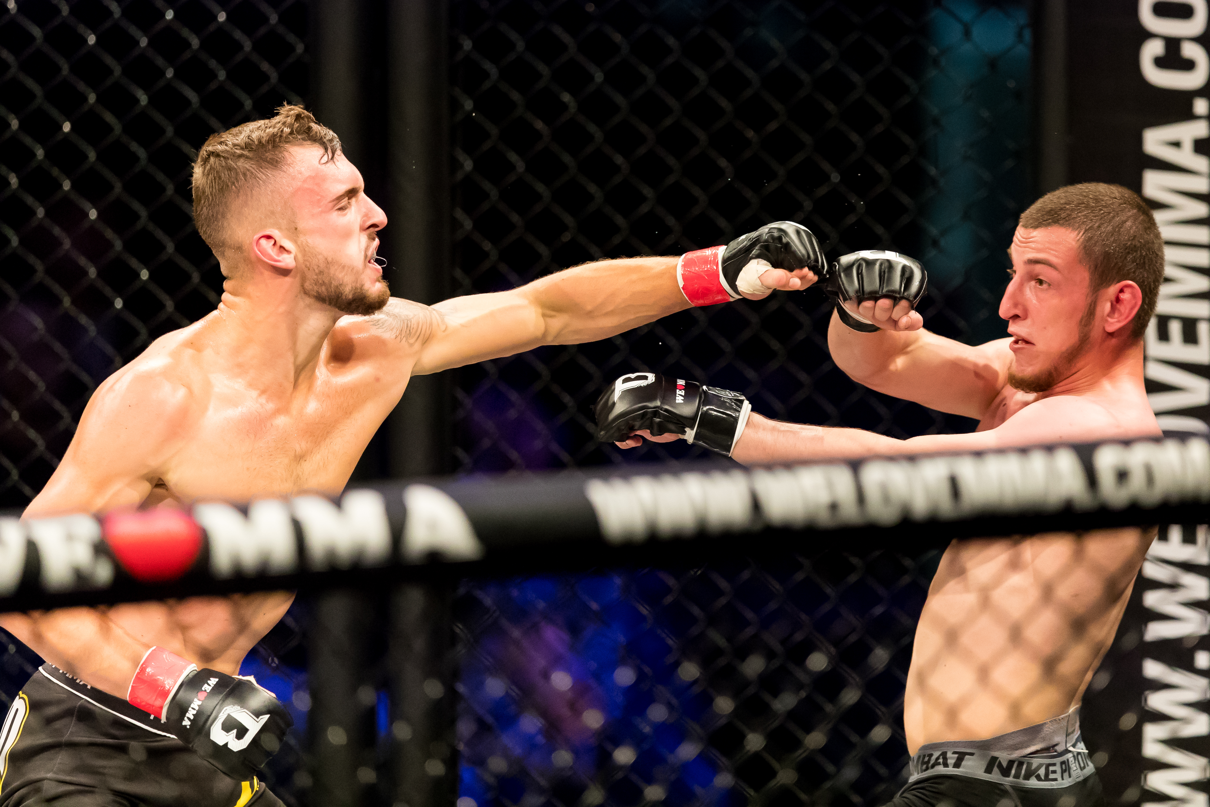 during We love MMA: Mixed Martial Arts at Friedrich-Ebert-Halle, Ludwigshafen, Rheinland-Pfalz, Germany on 2017-04-22, Photo: Sven Mandel